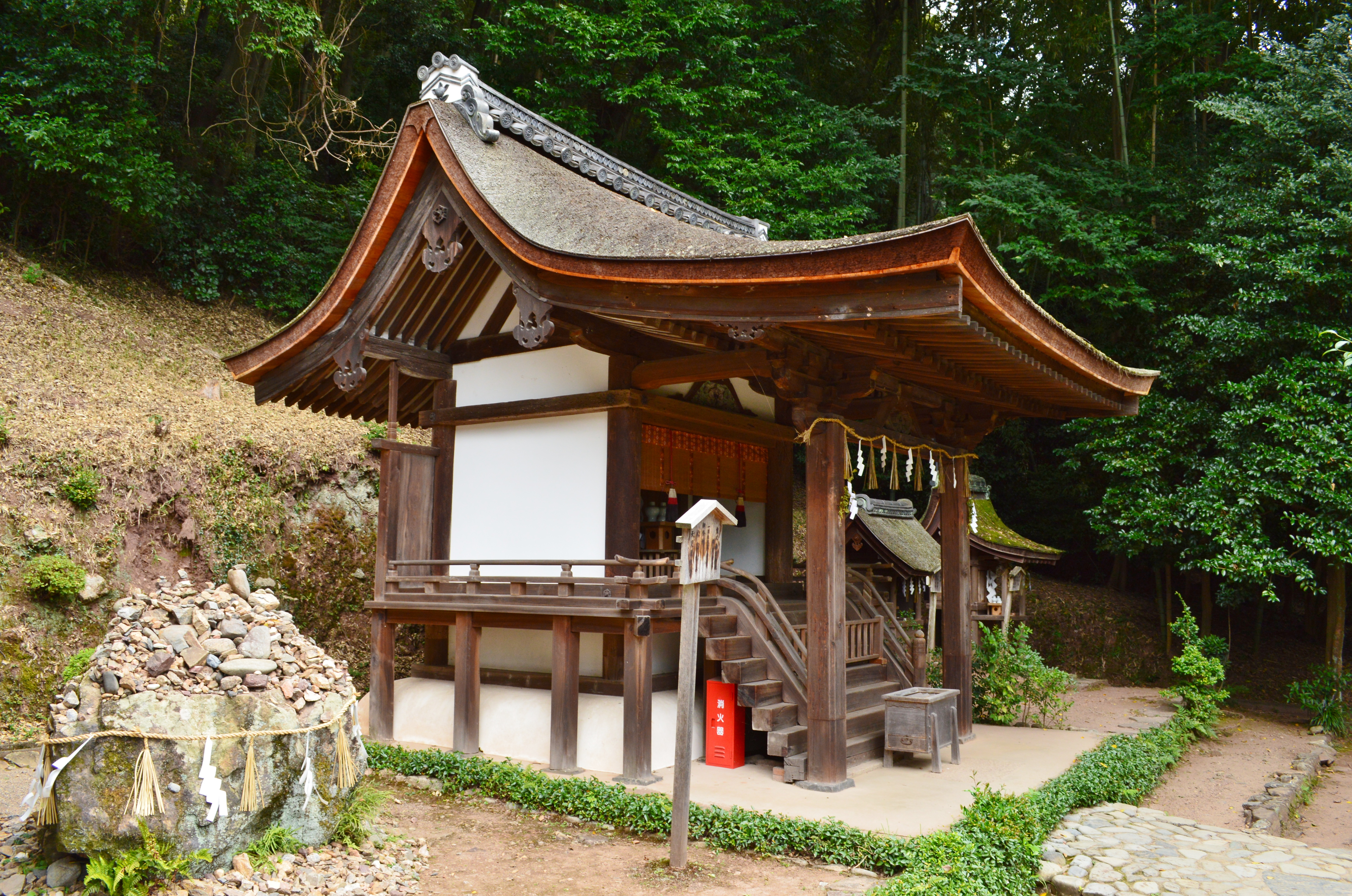 宇治上神社 境内春日社